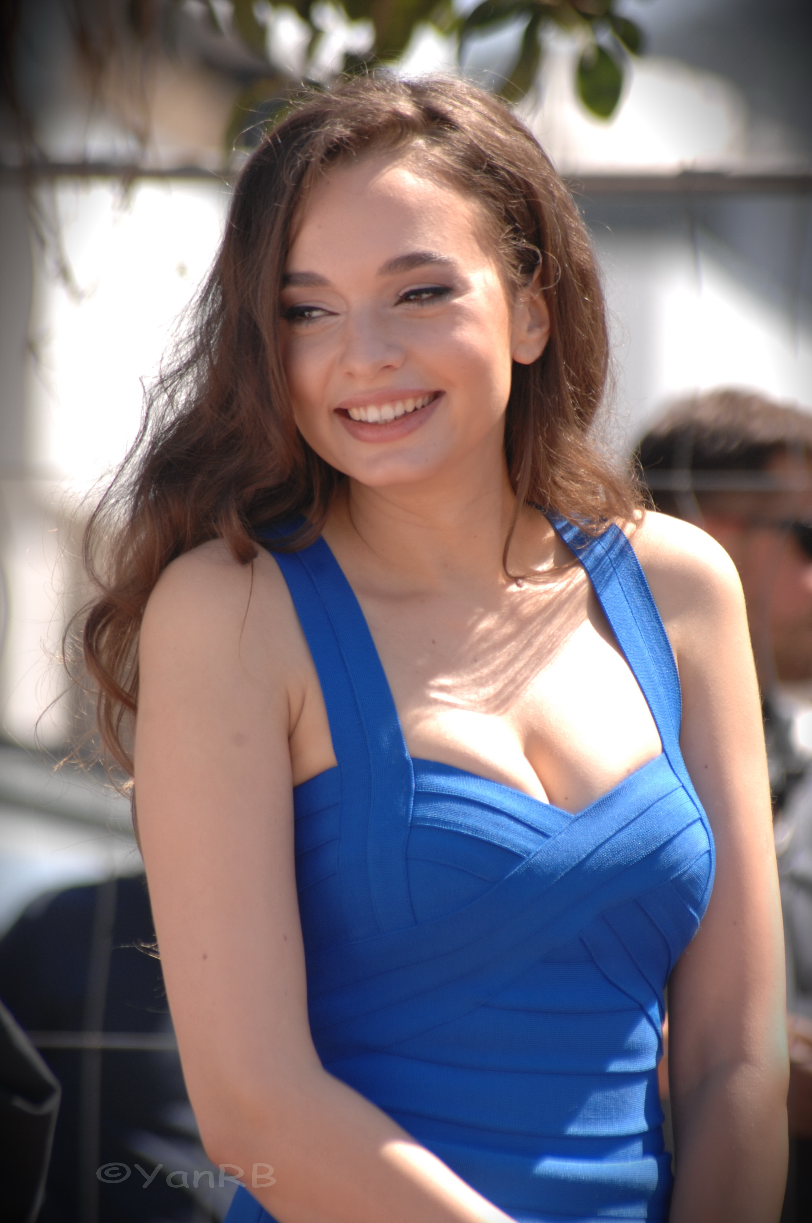 Ingrid Bișu en 2016